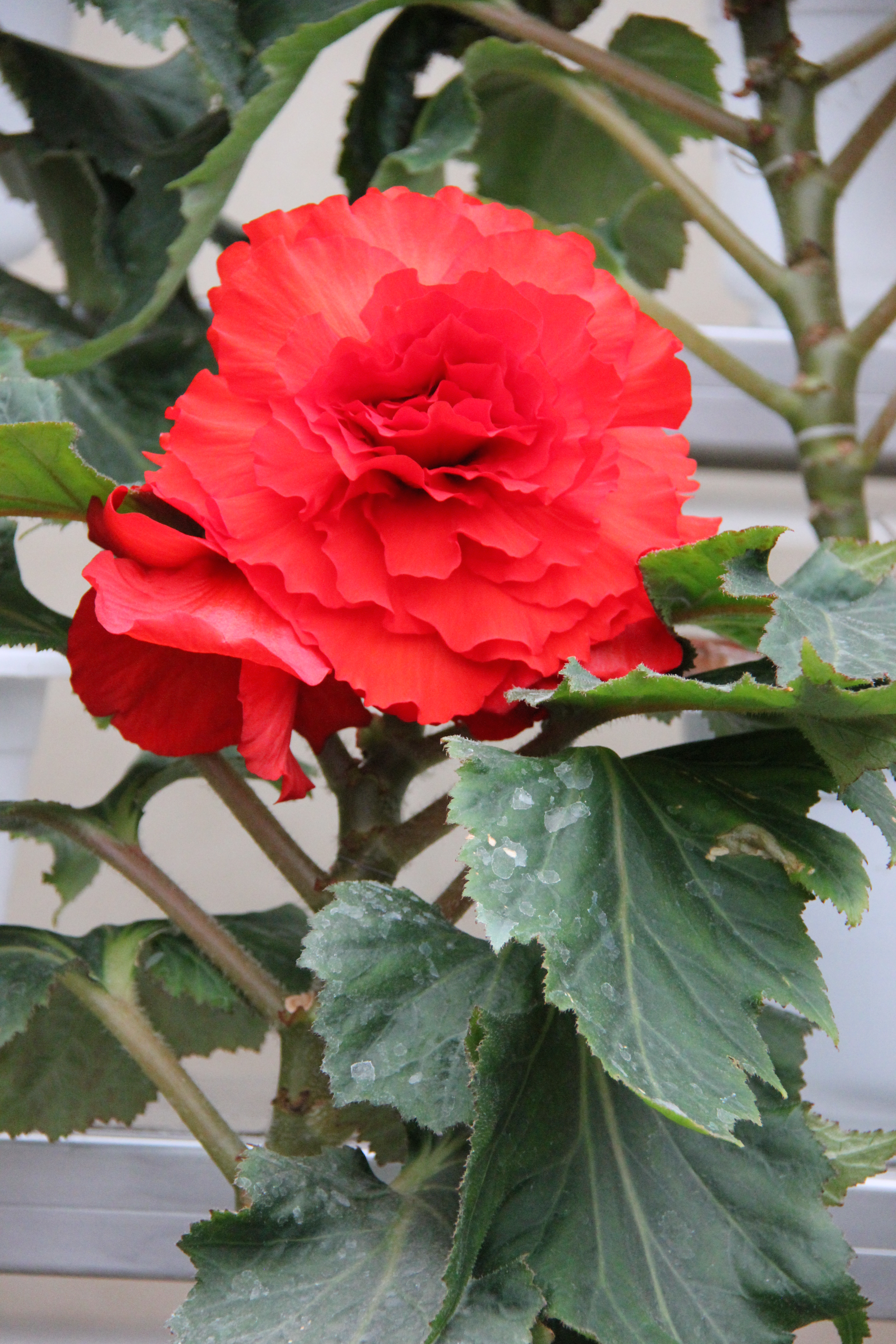 Kimjongilia